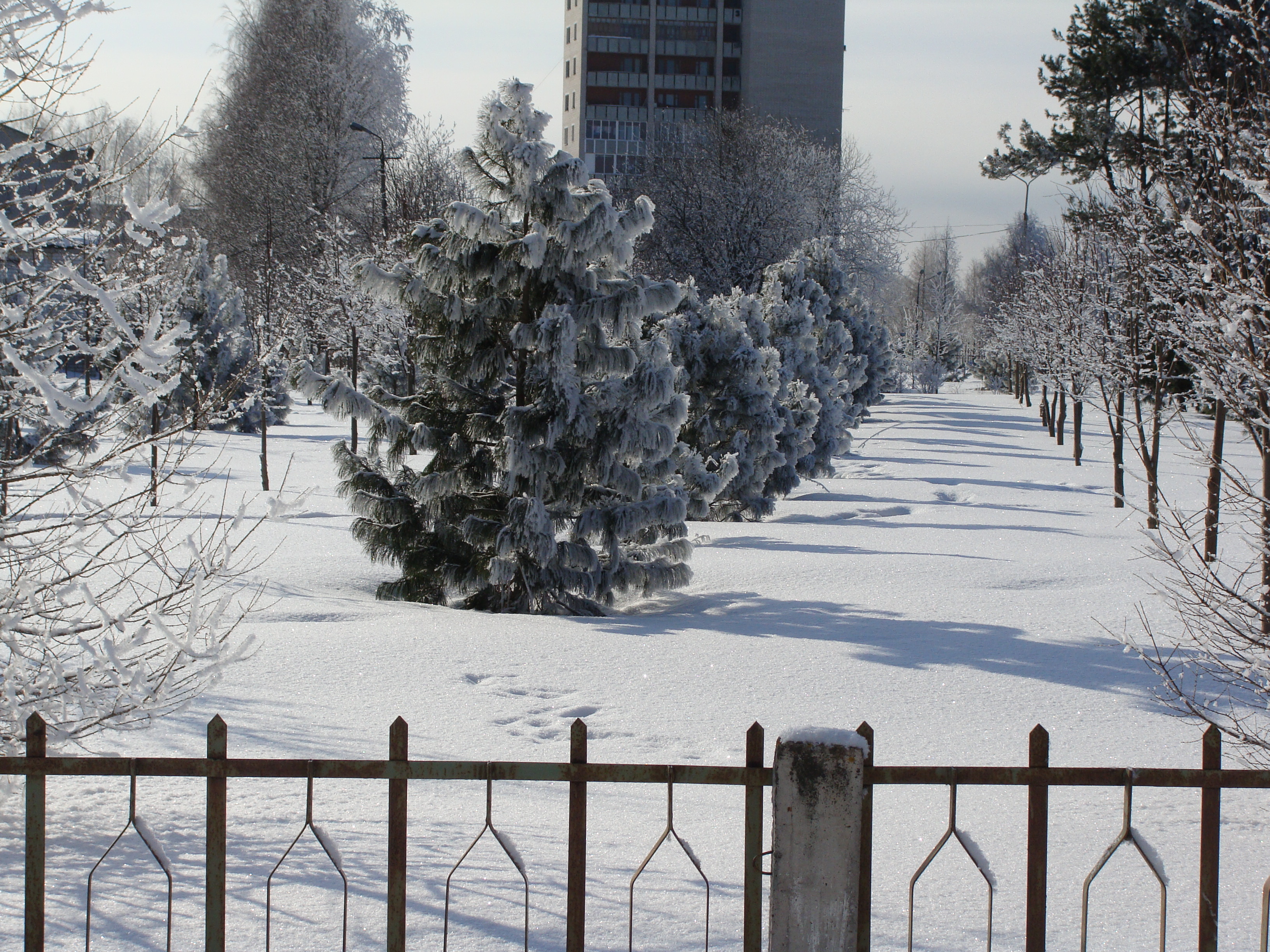 Кедровая роща зимой, Коряжма.